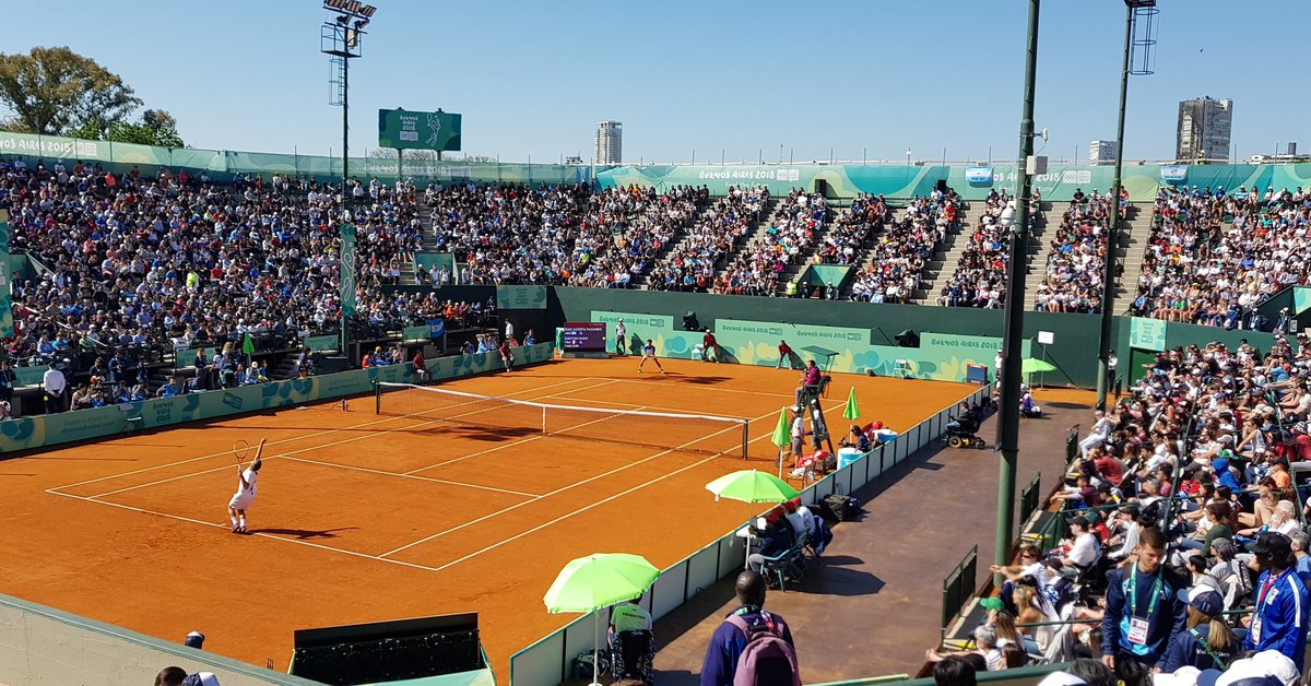 durante jjoo de la juventud 2018